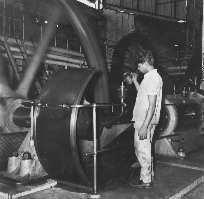 Negatief. Onderhoud van de molenmachine in suikerrietfabriek Mariënburg